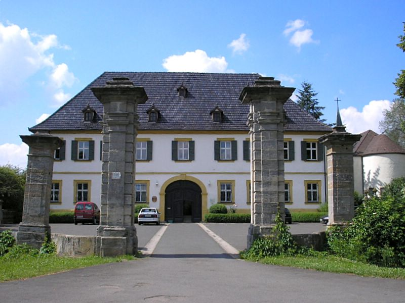 Schloss Pfaffendorf (Landkreis Haßberge, Unterfranken) / Pfaffendorf Castle, Lower Franconia, Germany. Gesamtansicht / Total view. Eigene Aufnahme, Juni 2006 / Own photo, June 2006